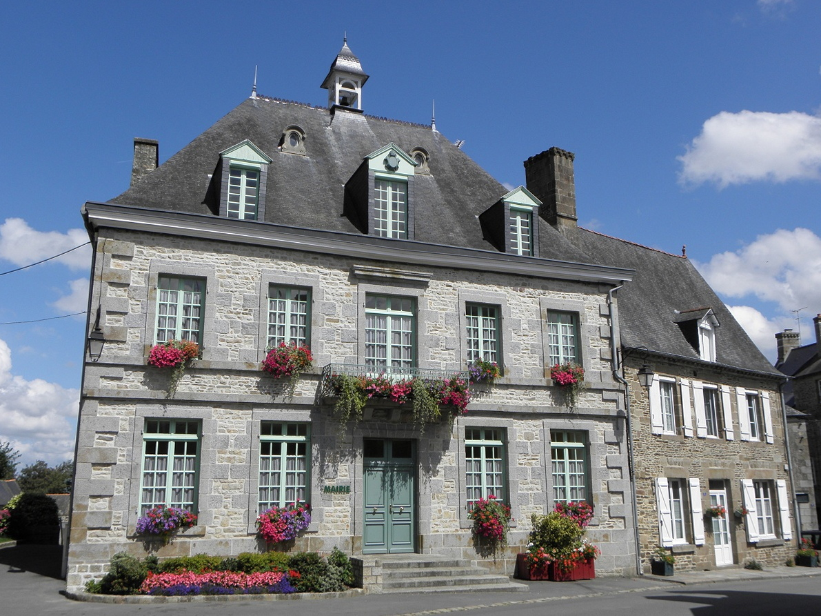 Mairie d'Antrain (35).